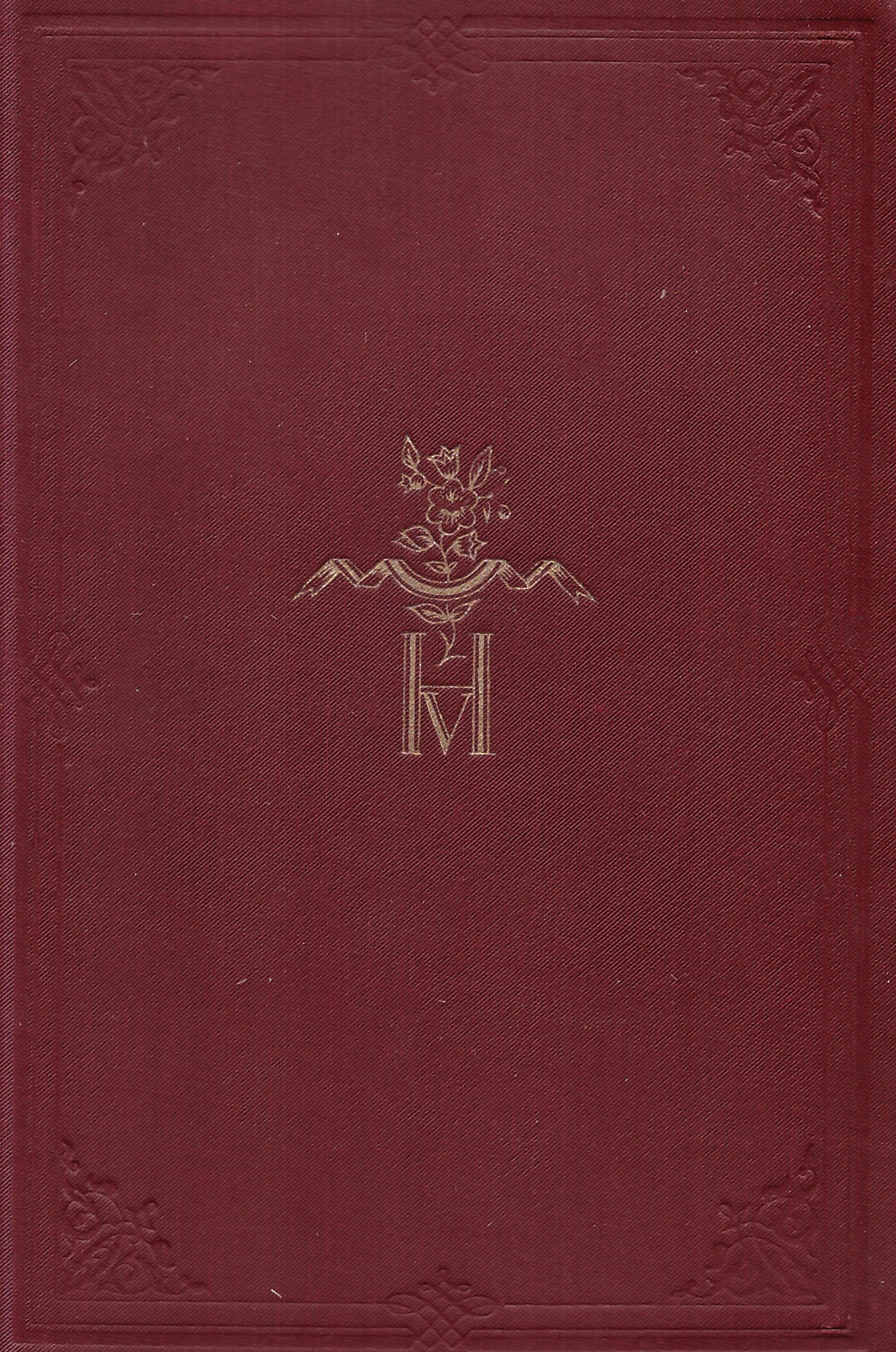 Hugo Victor összes regényei és elbeszélései (1920-as évek, a borító készítője nem ismert)